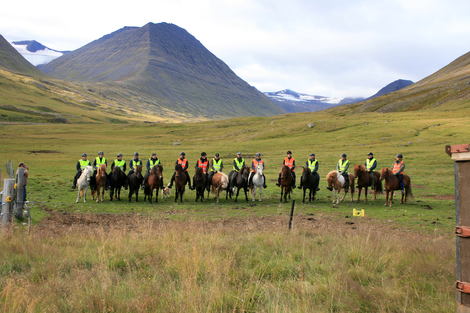 Gangnamenn í Sveinsstaðaafrétt í 1. göngum 2008